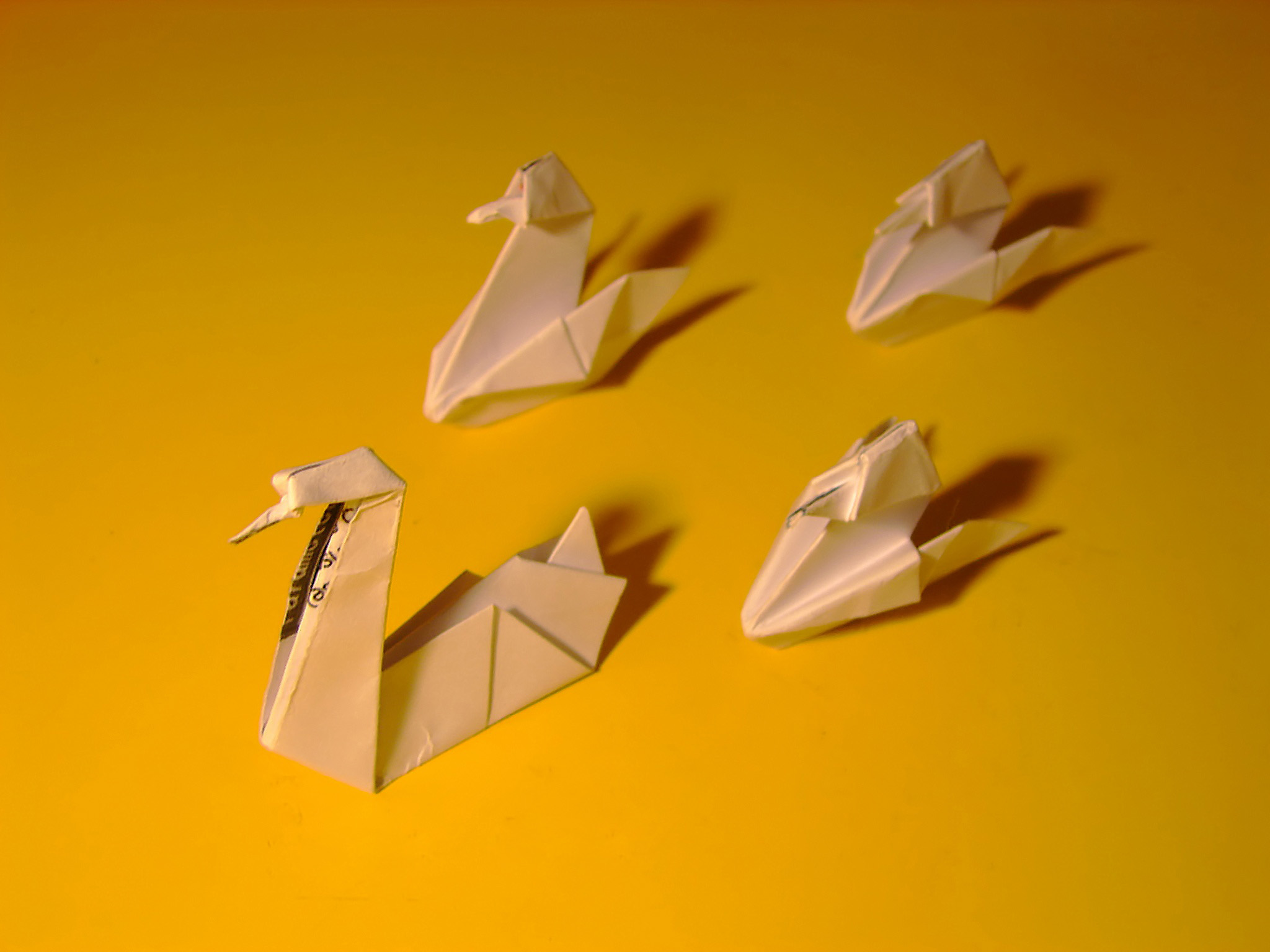 Origami